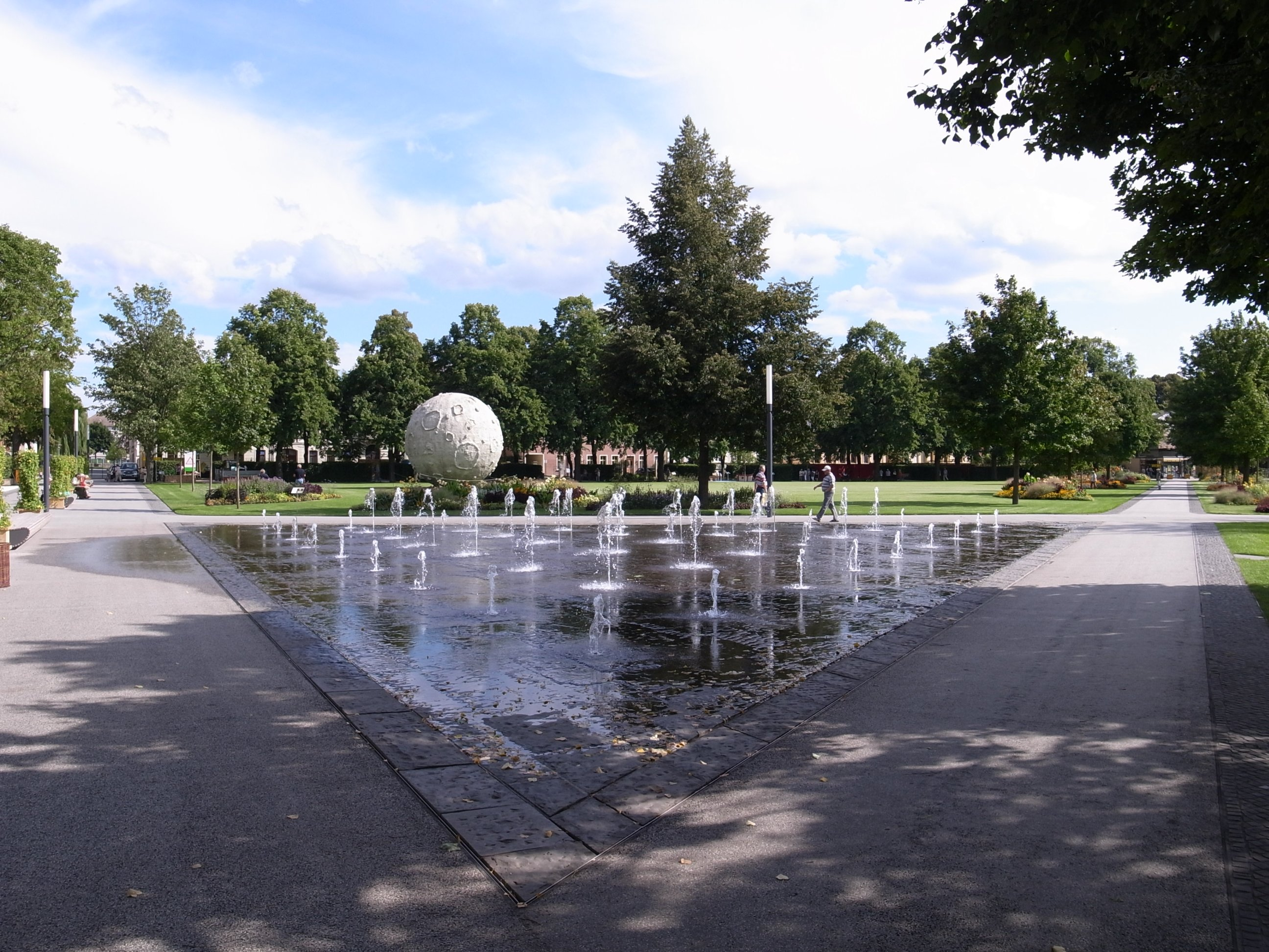 Aschersleben, Herrenbreite Fontänenfeld